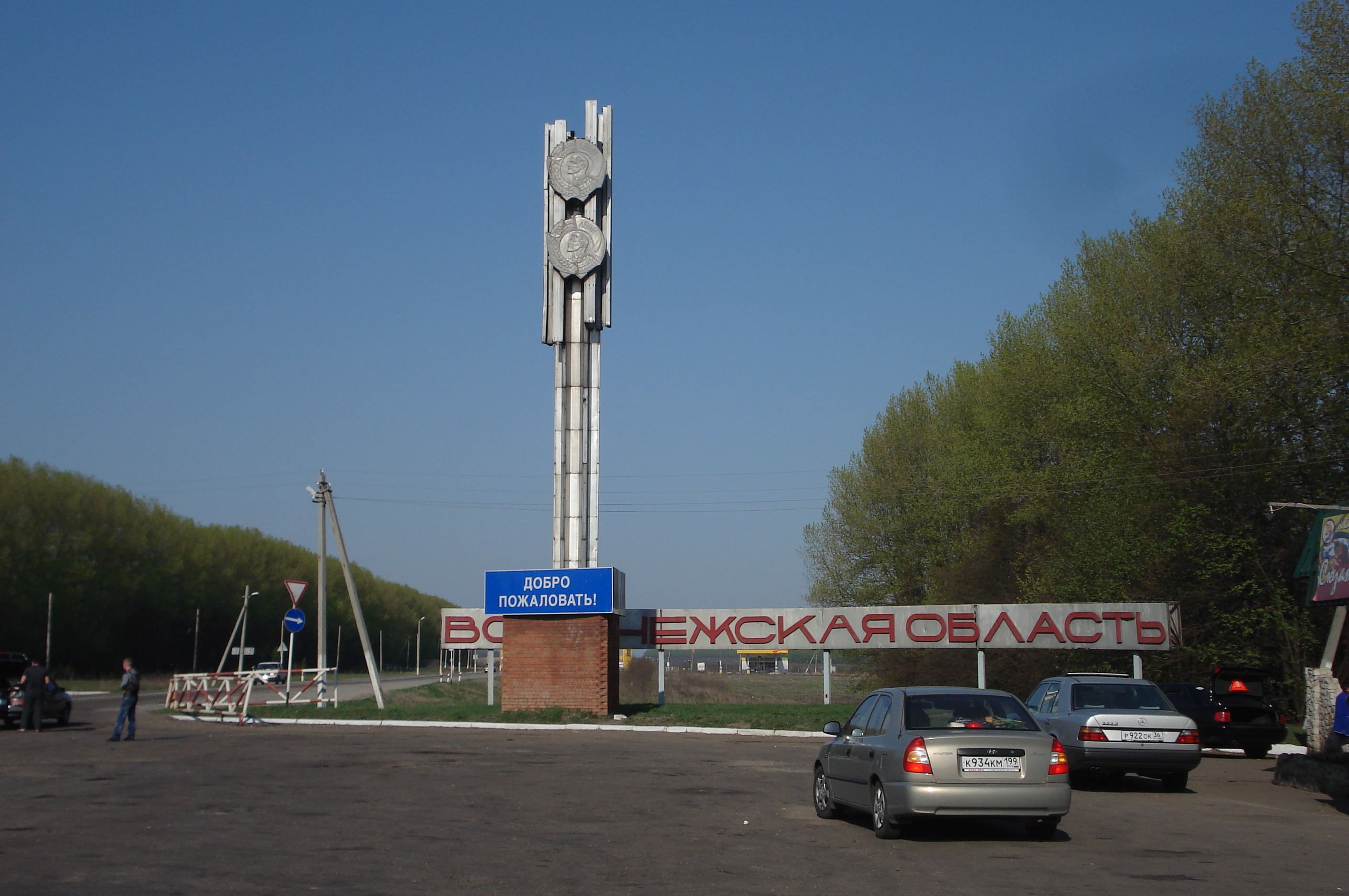 Въезд в Воронежскую область по трассе А144